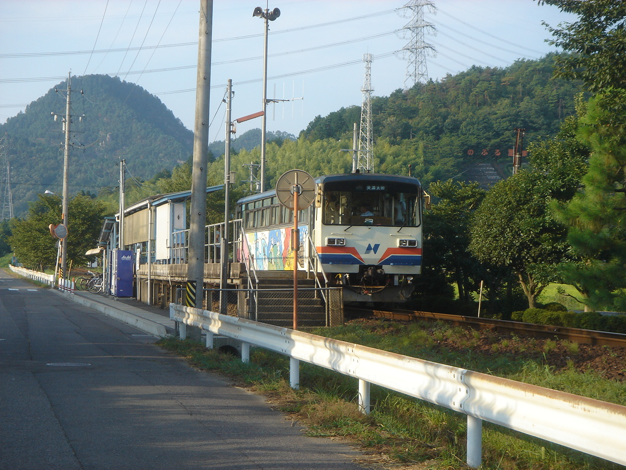 Seki-Shimouchi Station（関下有知駅）,Seki,Gifu,Japan(岐阜県関市)で南西より撮影。